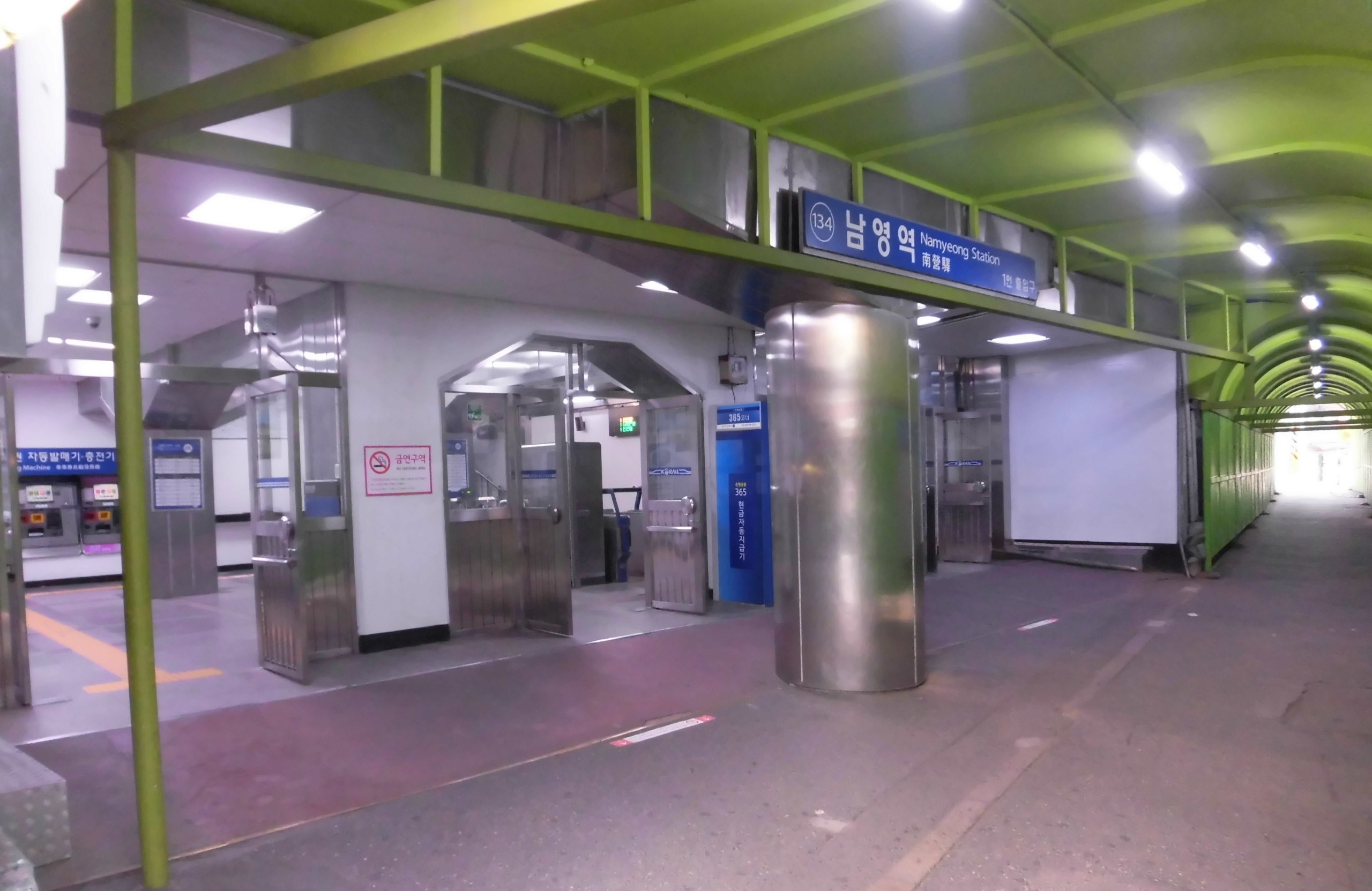 경부선 남영역